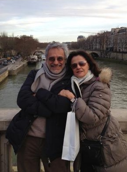 O diretor teatral e apresentador de tevê Aderbal Freire Filho e a atriz Marieta Severo em Paris.